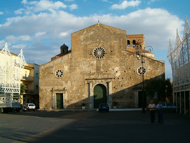 Ferrandina, S. Maria della Croce picture taken by user Idéfix, july 2003